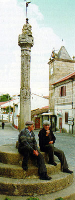 Sentados no pelourinho a conversar.